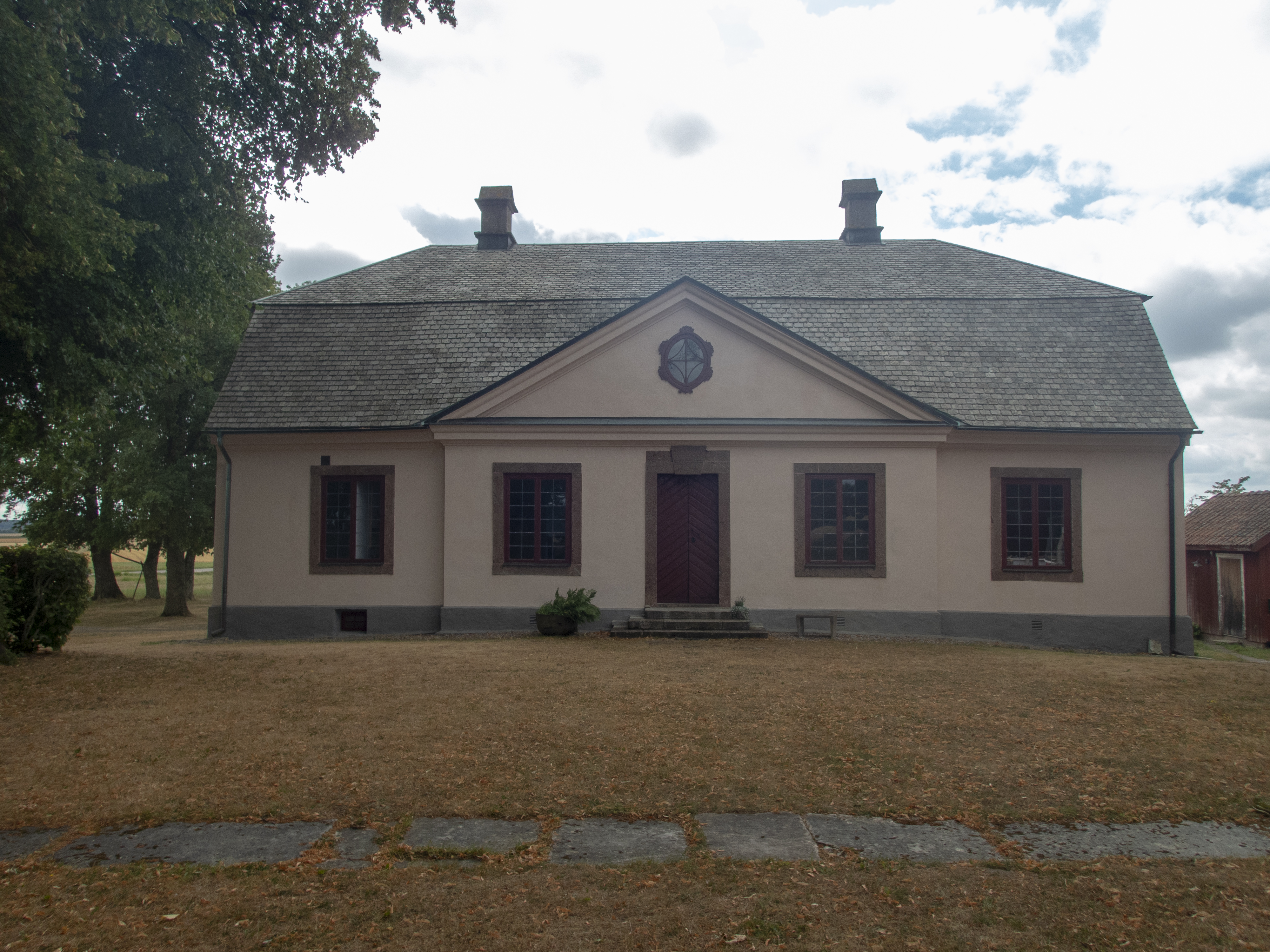 Kollängens tingshus utanför Götene. Murmästare J.G Günther gjorde en ritning som ändrades 1783 av C. F. Adelcrantz och Thure G. Wennberg vid Överintendentsämbetet. Byggnaden fungerade som tingshus mellan åren 1787 - 1904.